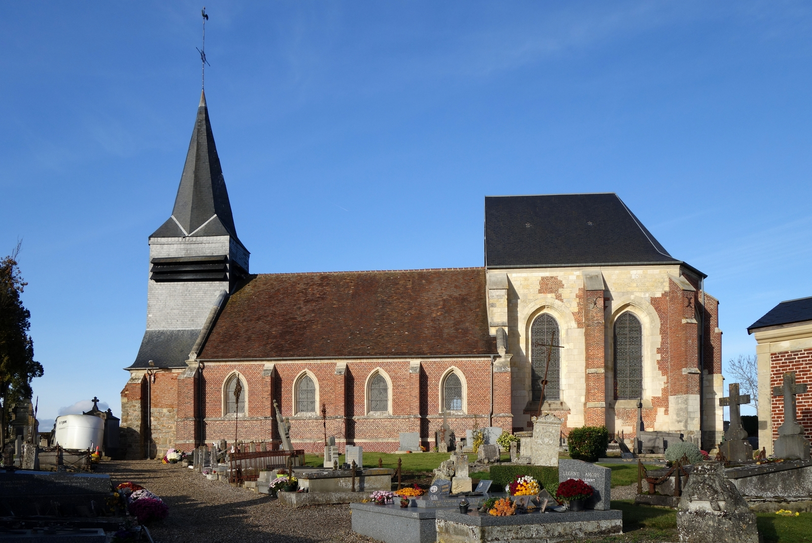 Eglise